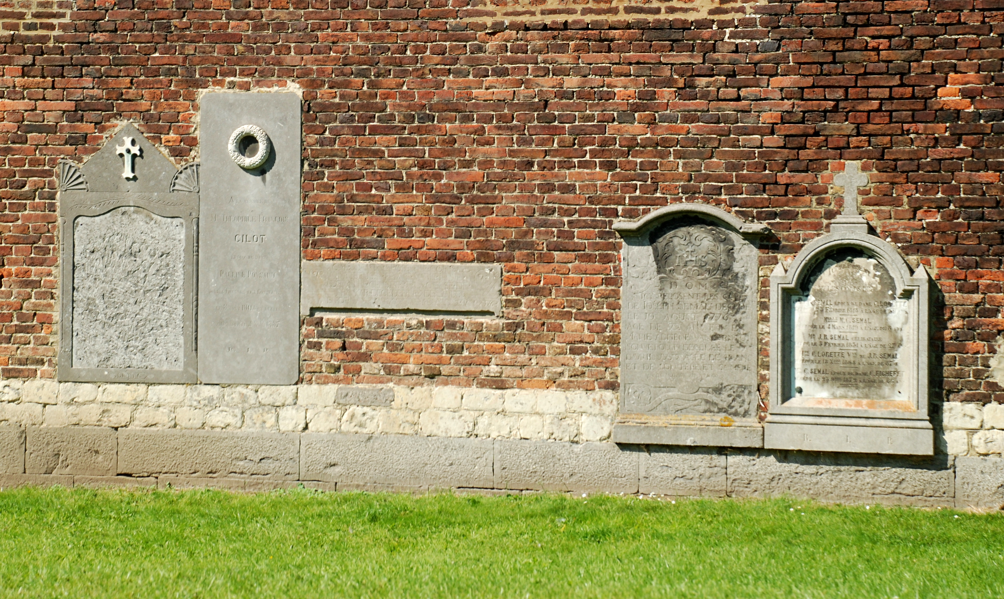 Belgique - Brabant wallon - Église Saint-Martin de Ways - Ancien cimetière paroissial